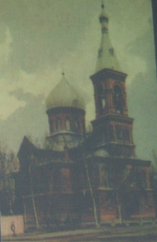 Сестрорецк СПб. Вид ПетроПавловской церкви